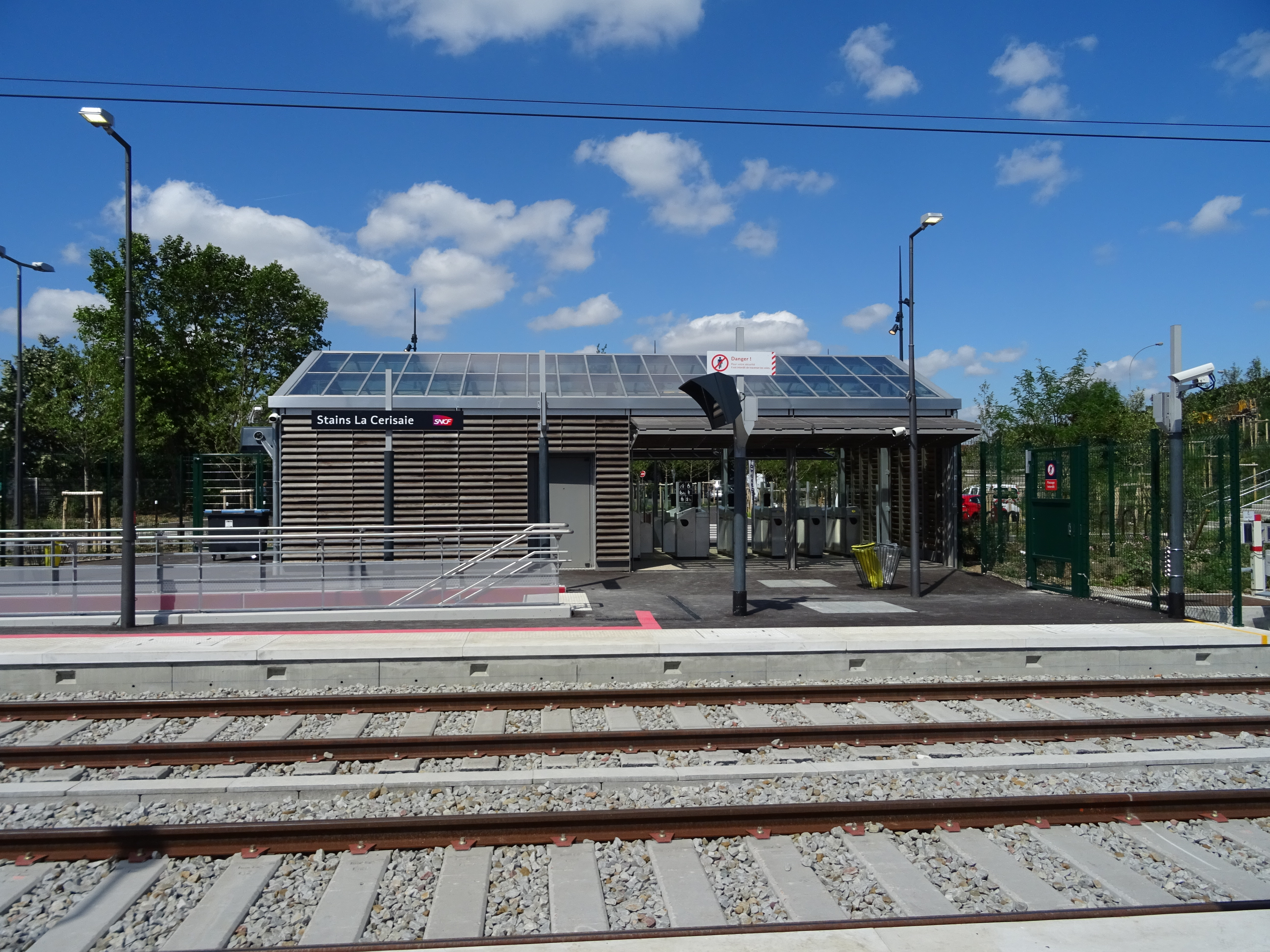 Voies et quais Stains la Cerisaie